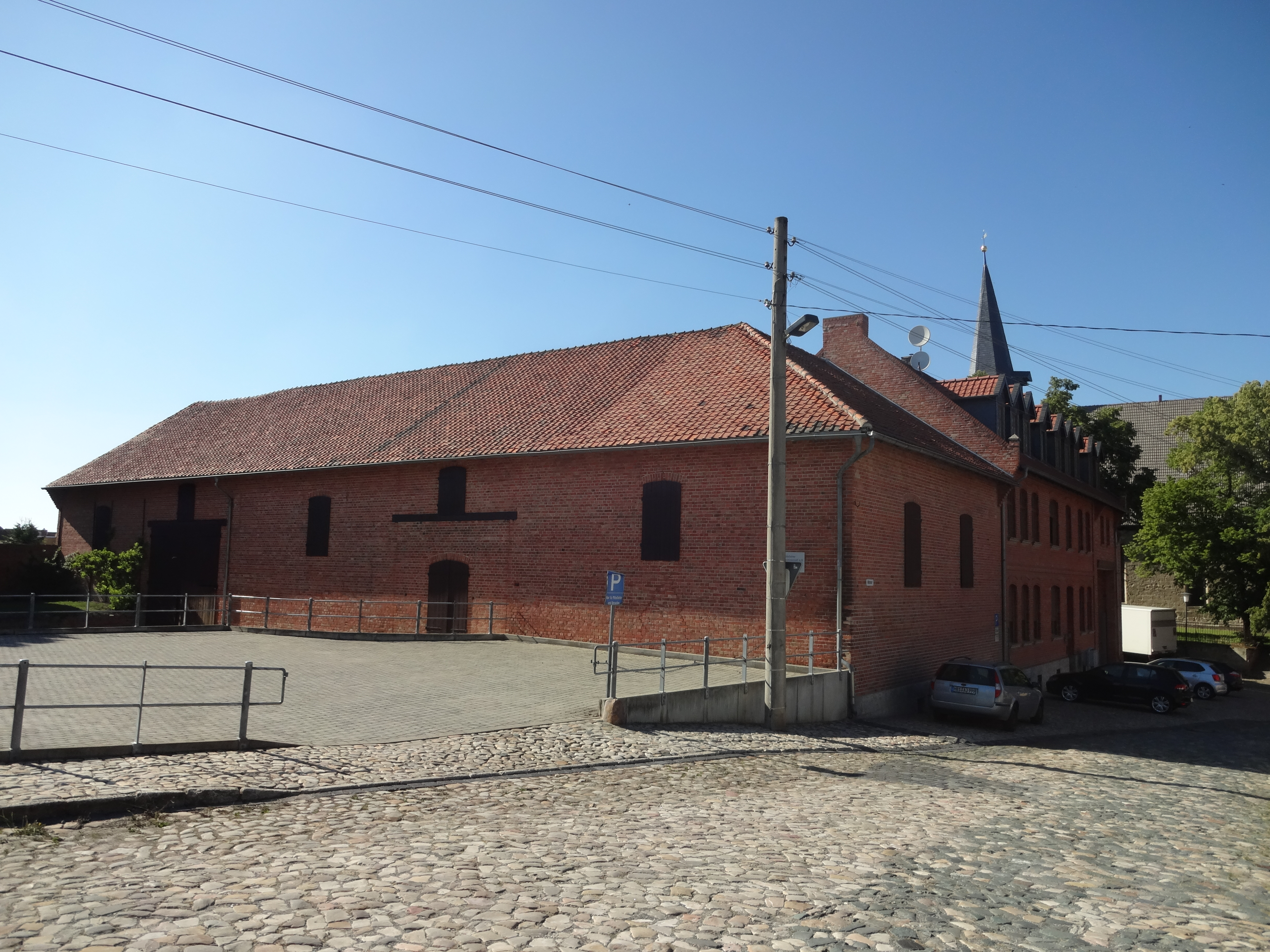 denkmalgeschützter Bauernhof Mittentor 8 in Harsleben